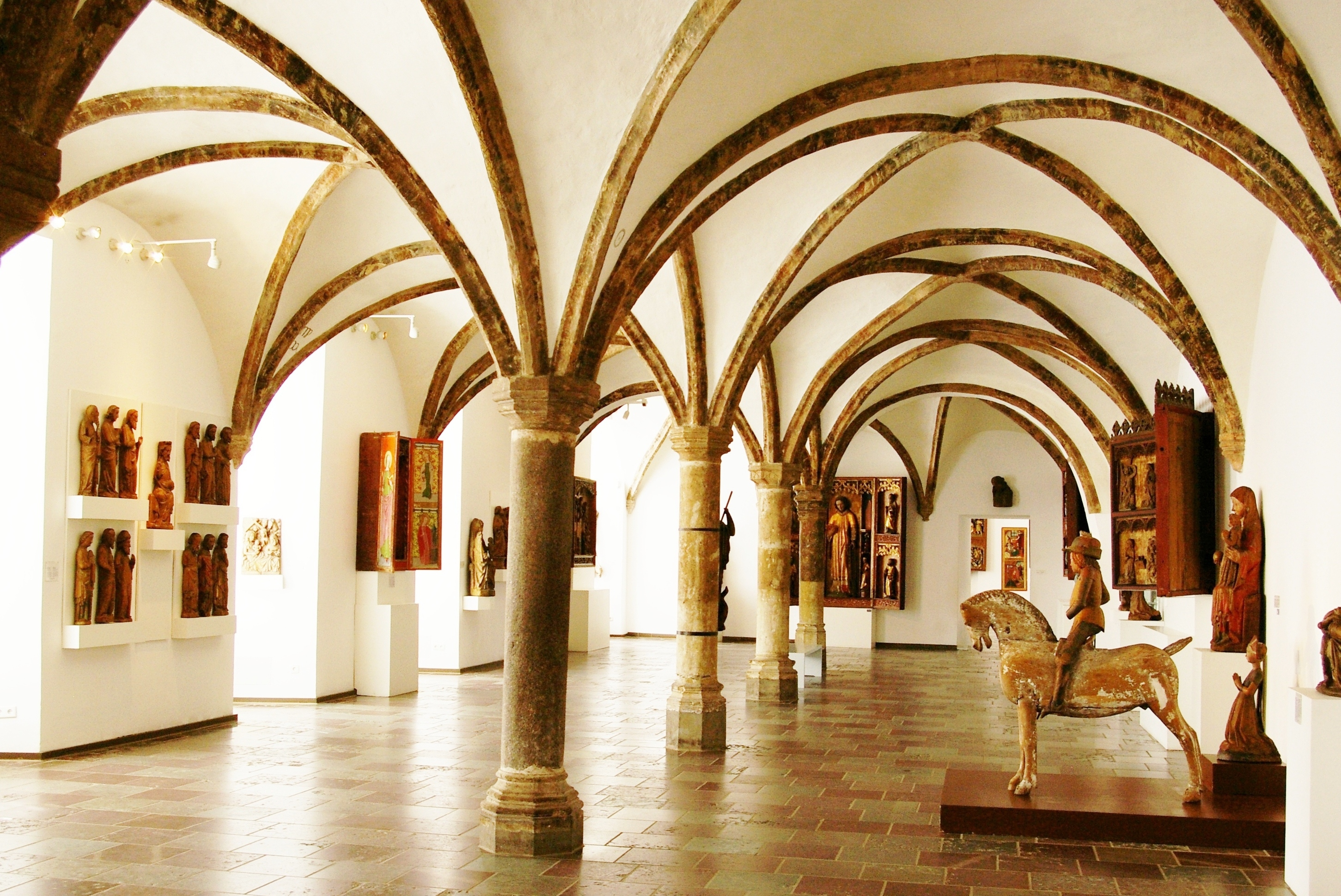 Sogenannte Königshalle (um 1500) im Erdgeschoss des Südflügels von Schloss Gottorf.